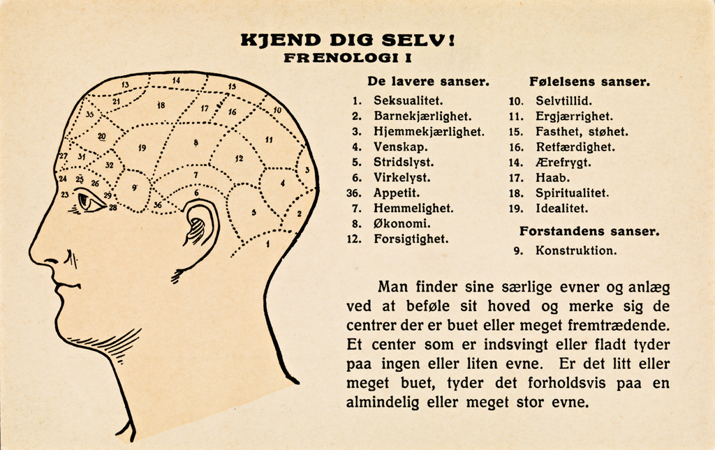 Tittel Kjend dig selv! Frenologi I Motiv / Motif: Postkort. Frenologi er en lære om hvordan sjelsegenskaper er plassert forskjellige steder i menneskehjernen og påvirker hjernens fysiske struktur, og hvordan dette kan avleses i den ytre formen på hodeskallen. Læren ble først fremsatt av den østerrikske fysiologen Franz Joseph Gall (1758–1828). Kunstner / Artist: ukjent / unknown Eier / Owner Institution: Nasjonalbiblioteket / National Library of Norway Bildesignatur / Image Number: blds_03786